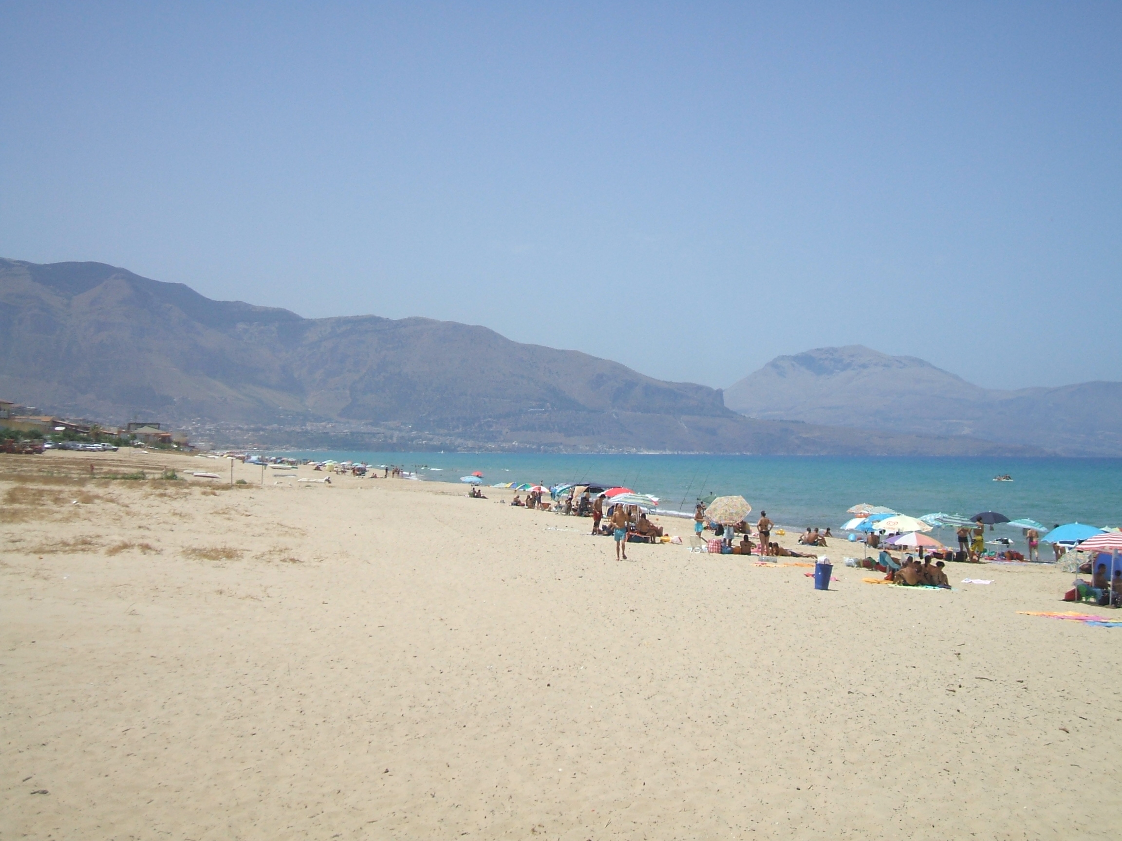 trapani_alcamo marina_1